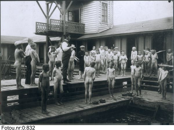 Löfströmska Kallbadinrättningen